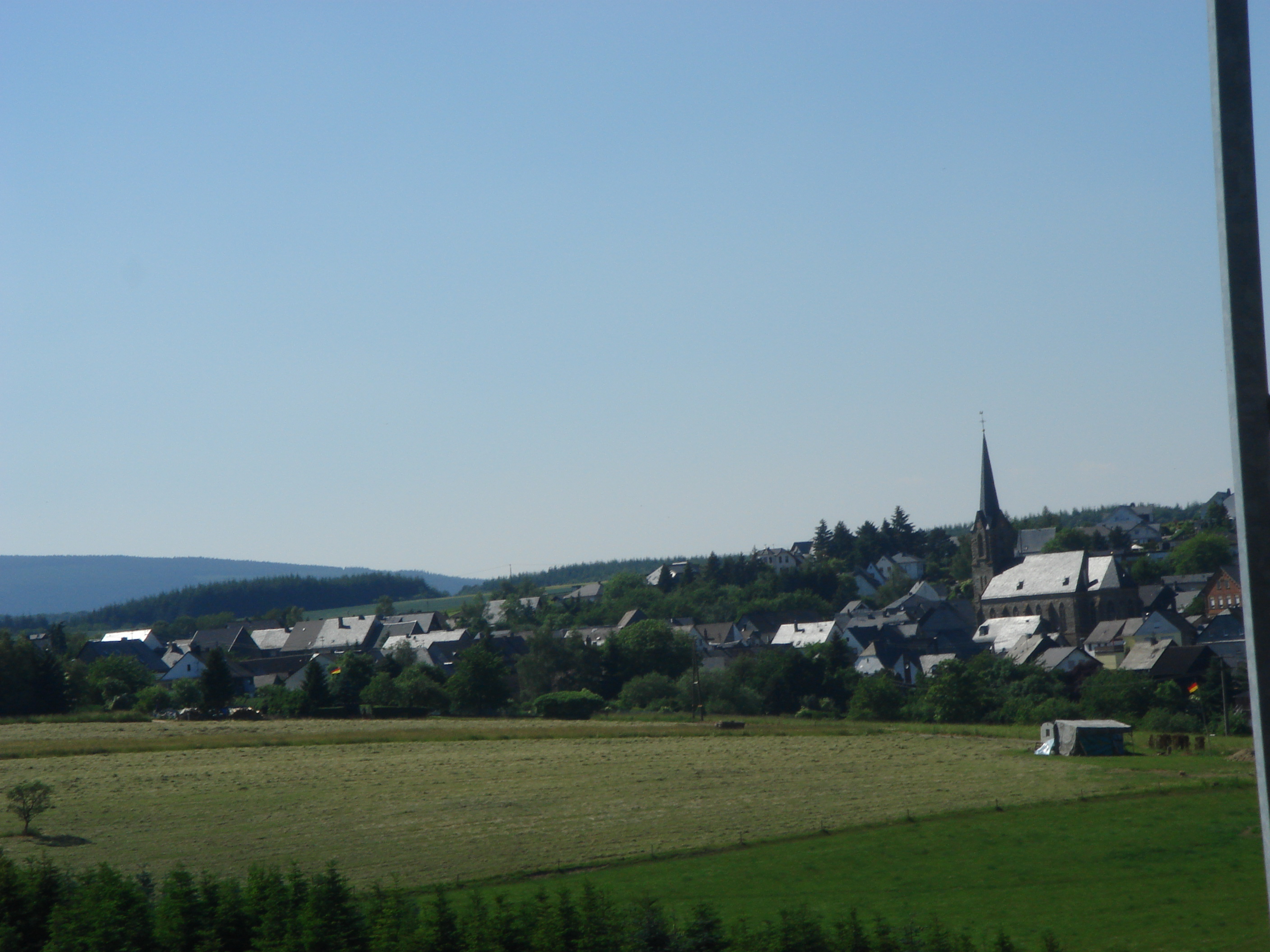 Bildbeschreibung: Auf der Strecke von Rudolfshaus nach Bundenbach gibt es einen Parkplatz mit Blick auf Bundenbach aus der Ferne.